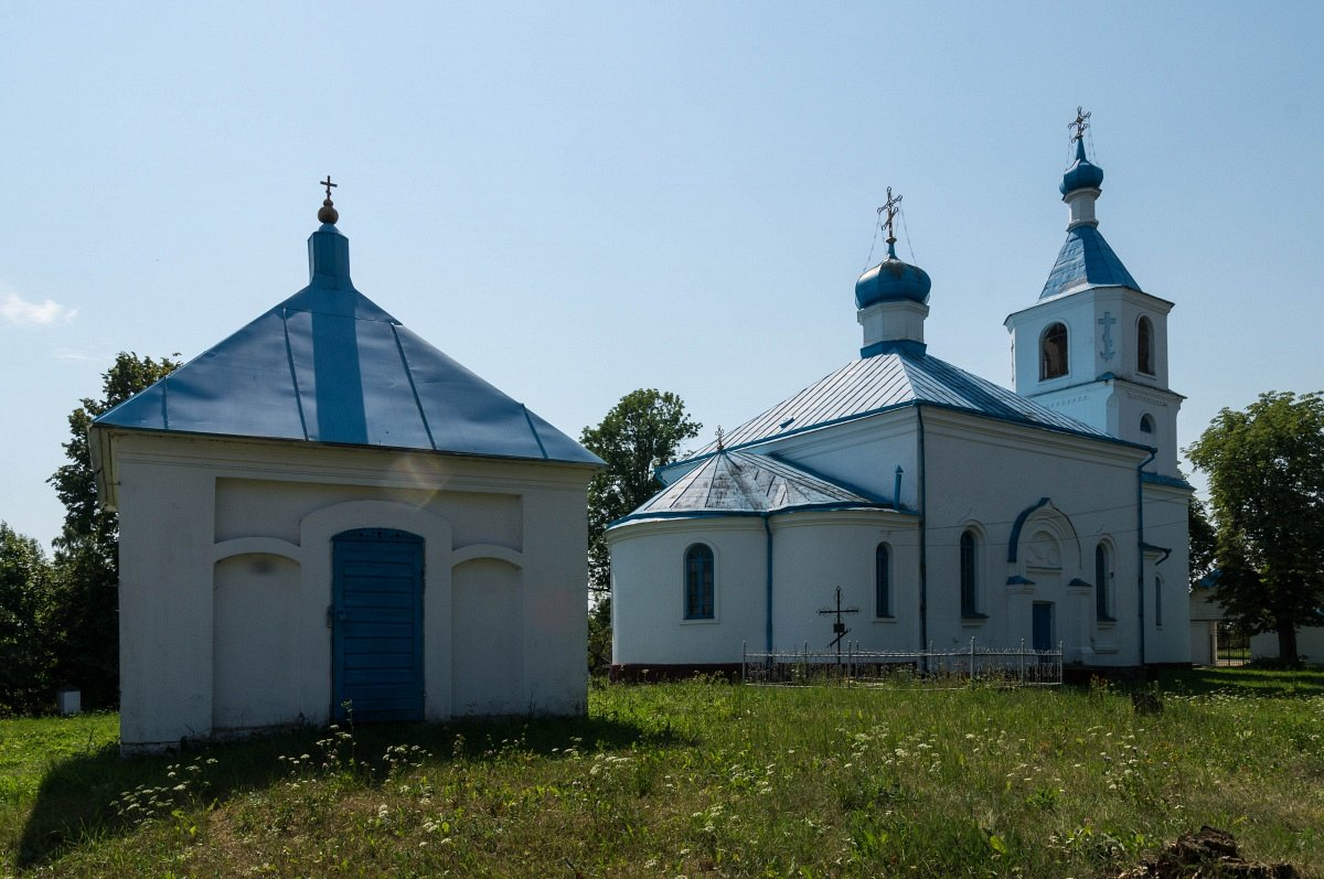 Чарневічы. Царква Св. Параскевы і капліца